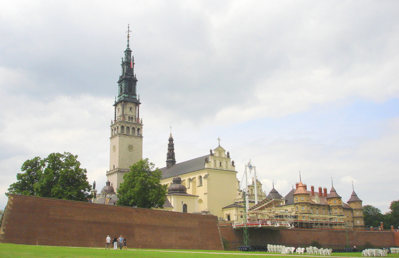 Częstochowa, kościół p.w. Wniebowzięcia NMP i Znalezienia Krzyża Św., 1425-1463, 1690-1696